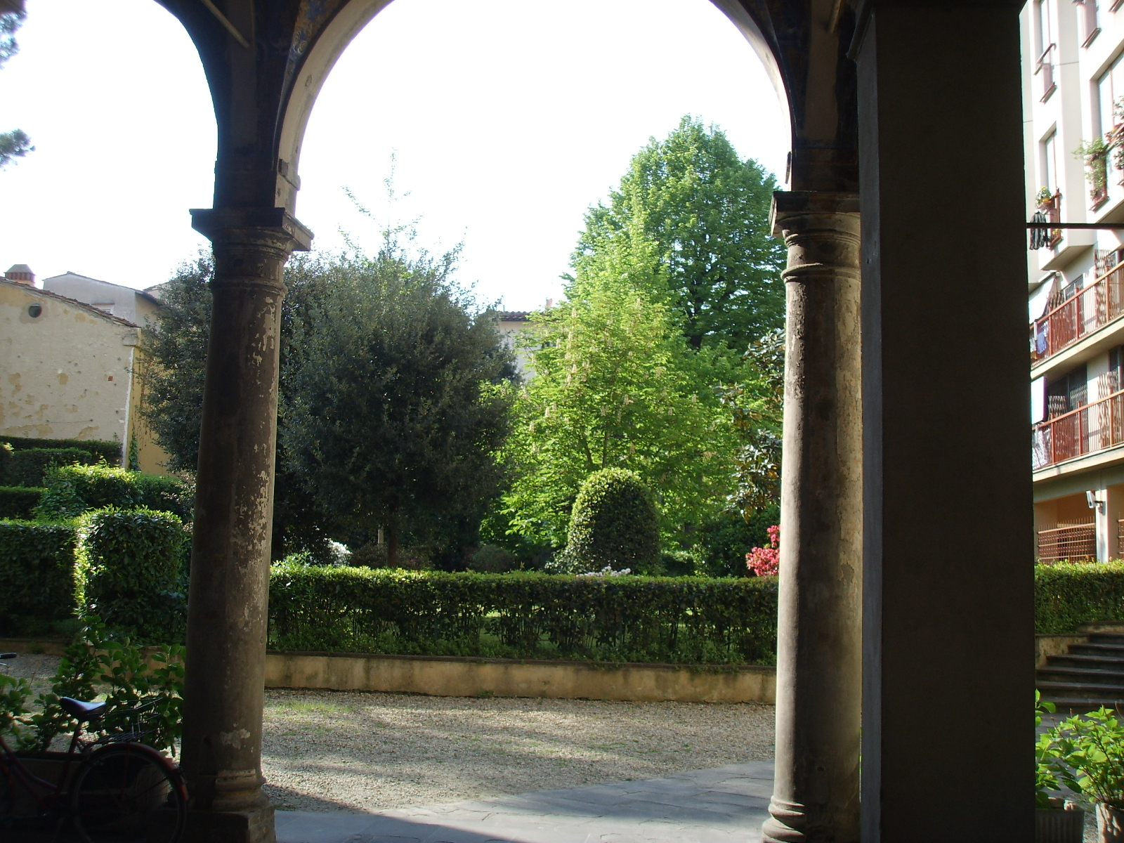 Palazzo_caccini in Florence